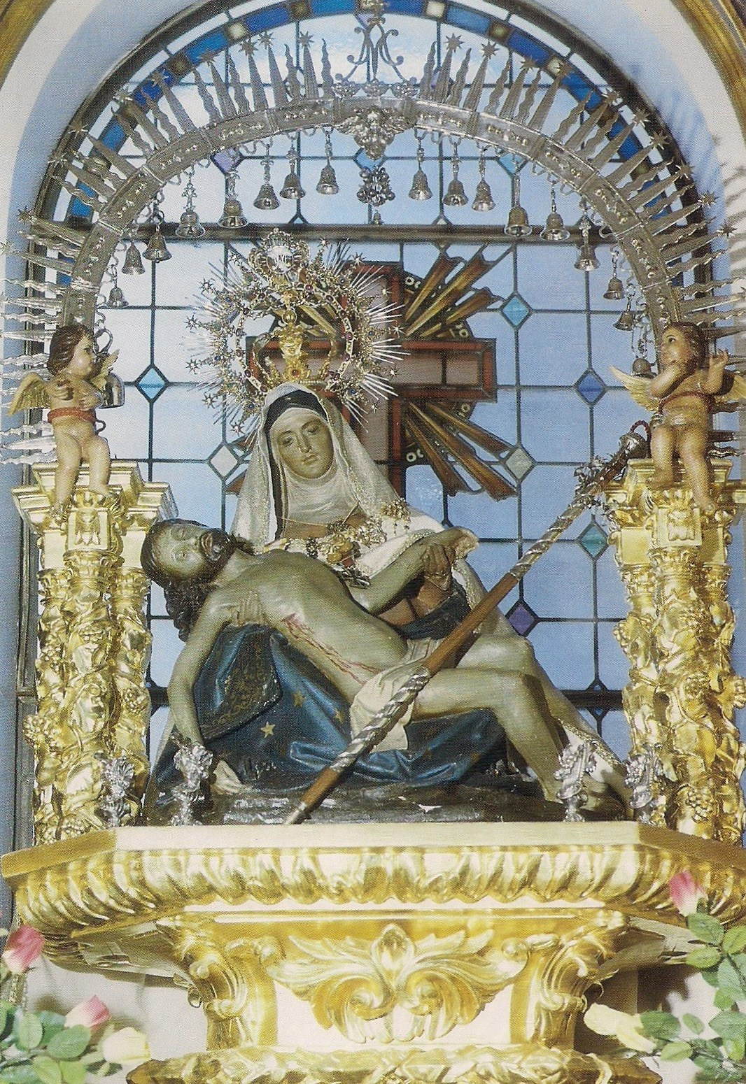 Imagen de la Virgen de la Piedad, en su capilla de la iglesia de San Pedro Apóstol de Santa Olalla